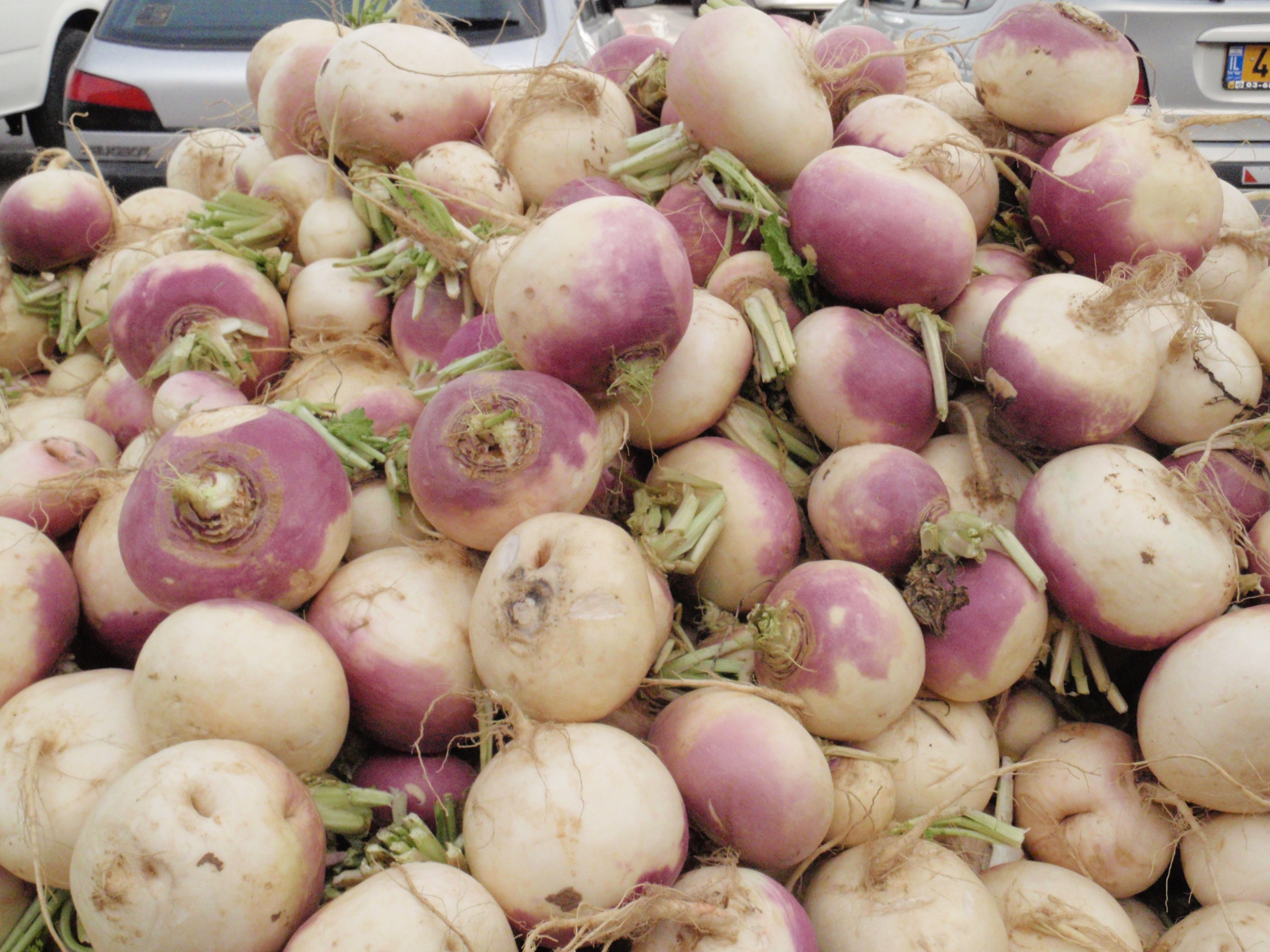 Shuk Hsayarim ירקות בשוק הסיירים Turnip at Sayarim-Market